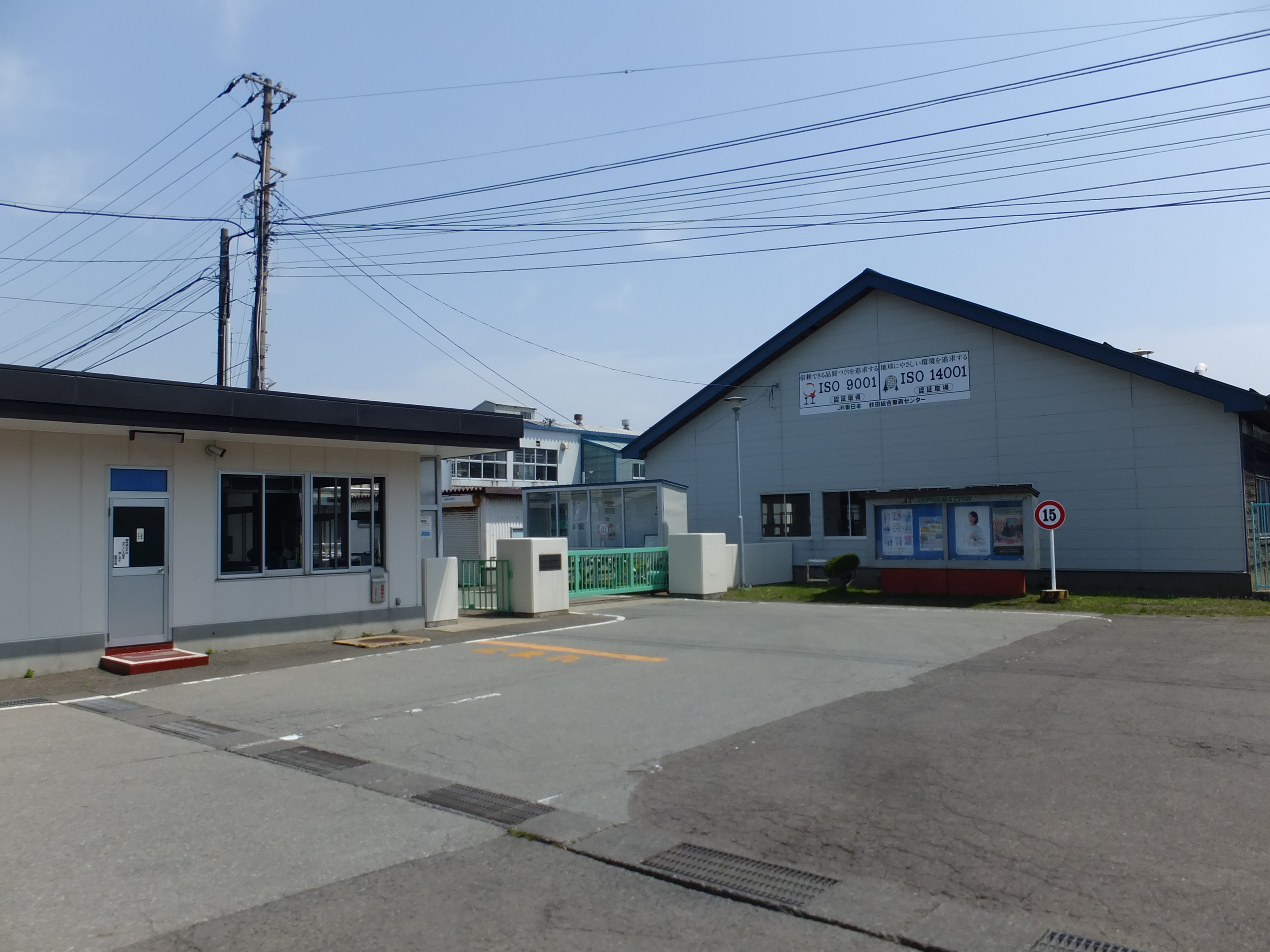 JR東日本 秋田総合車両センター(旧土崎工場)